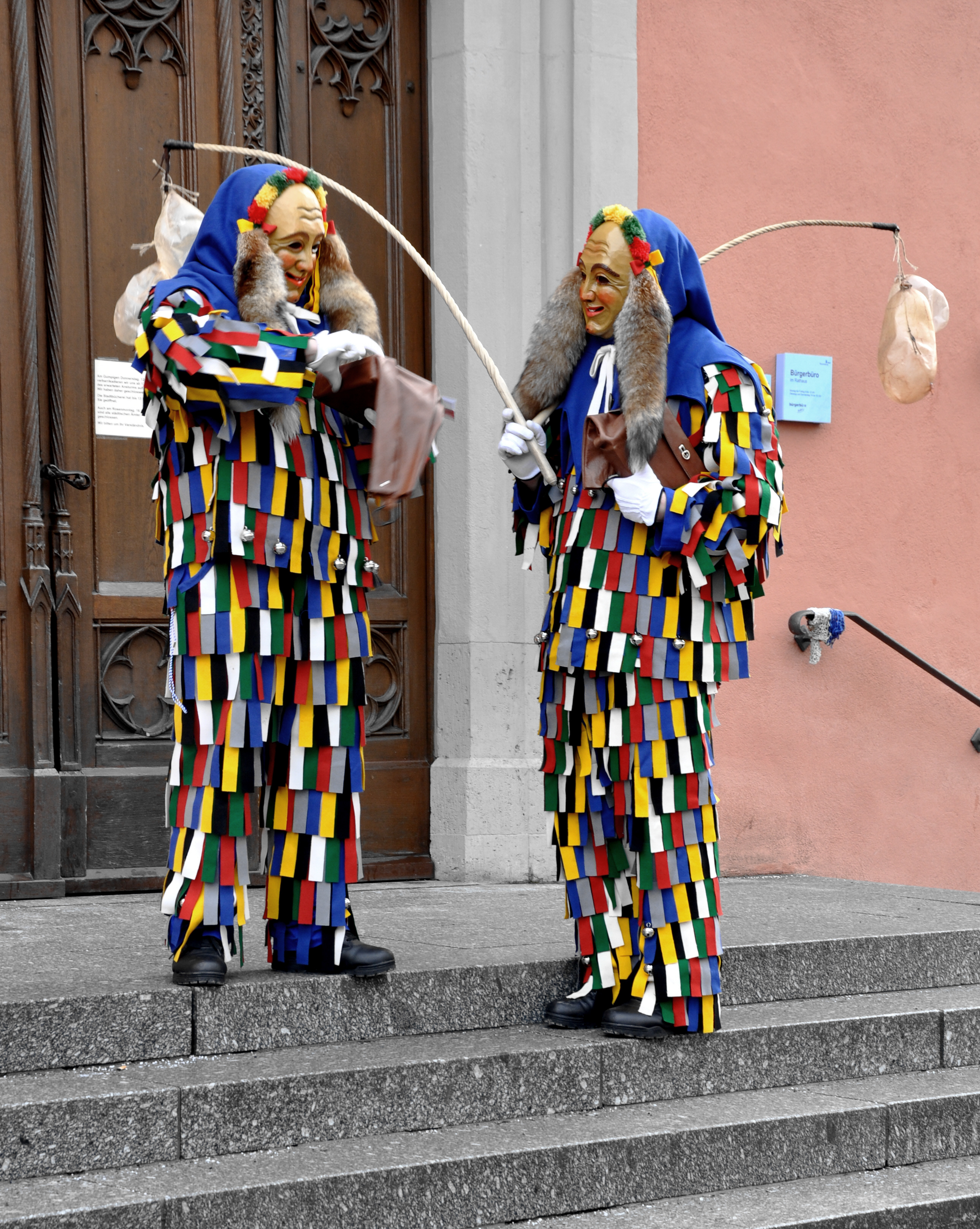 Zwei Butzhansel der Schwarze Veri Zunft Ravensburg am Fasnetssamstag vor dem Rathaus (kurz nach der Narrenverbrüderung)